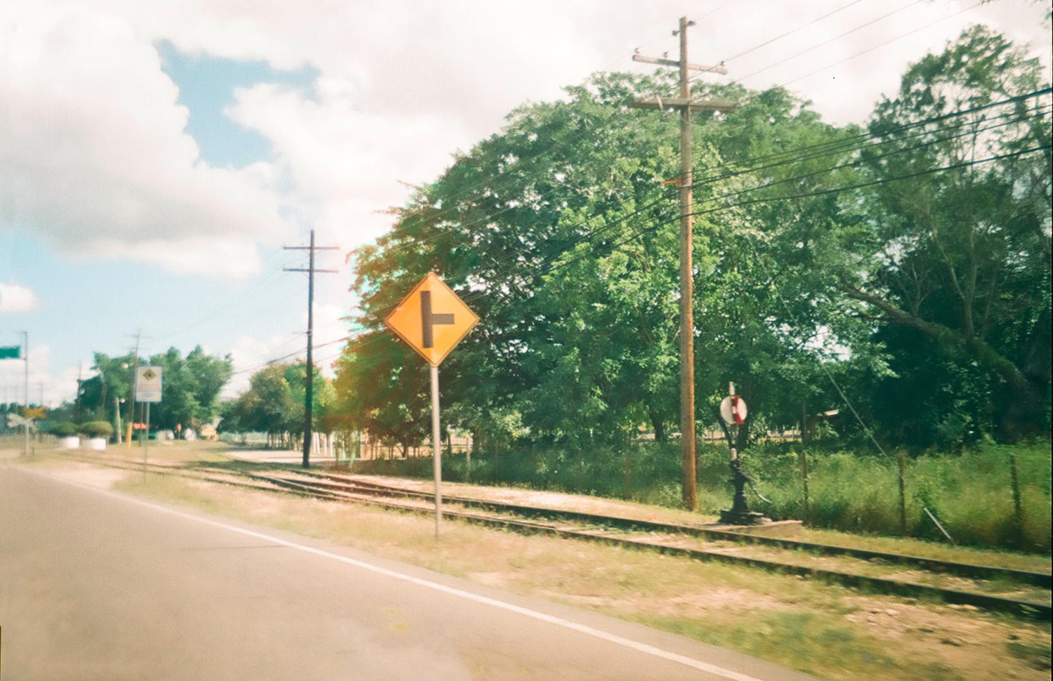 Rieles de la linea ferrea de Central Romana en La Romana, República Dominicana. La linea va para la zona franca de La Romana.